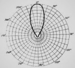 Richt karakteristiek Yagi antenne